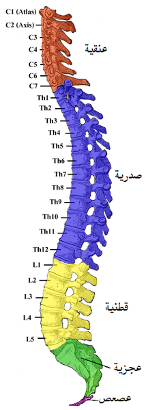 صورة للعمود الفقري